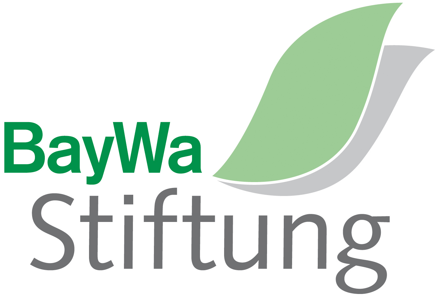 Logo